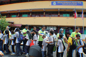 gambar sekolah